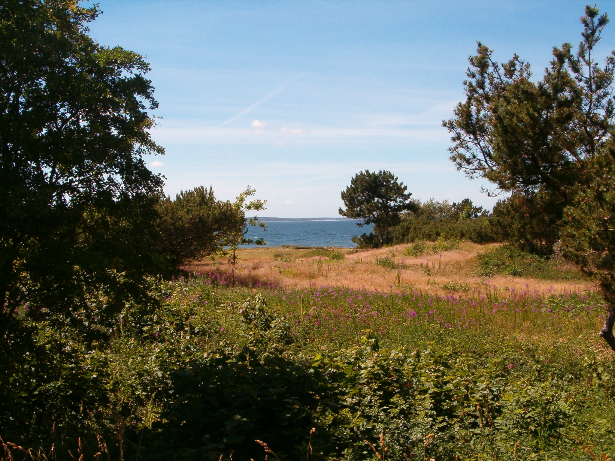 Pestkyrkogården i Domsten, Helsingborgs kommun. Numera en strandäng mitt i samhället.